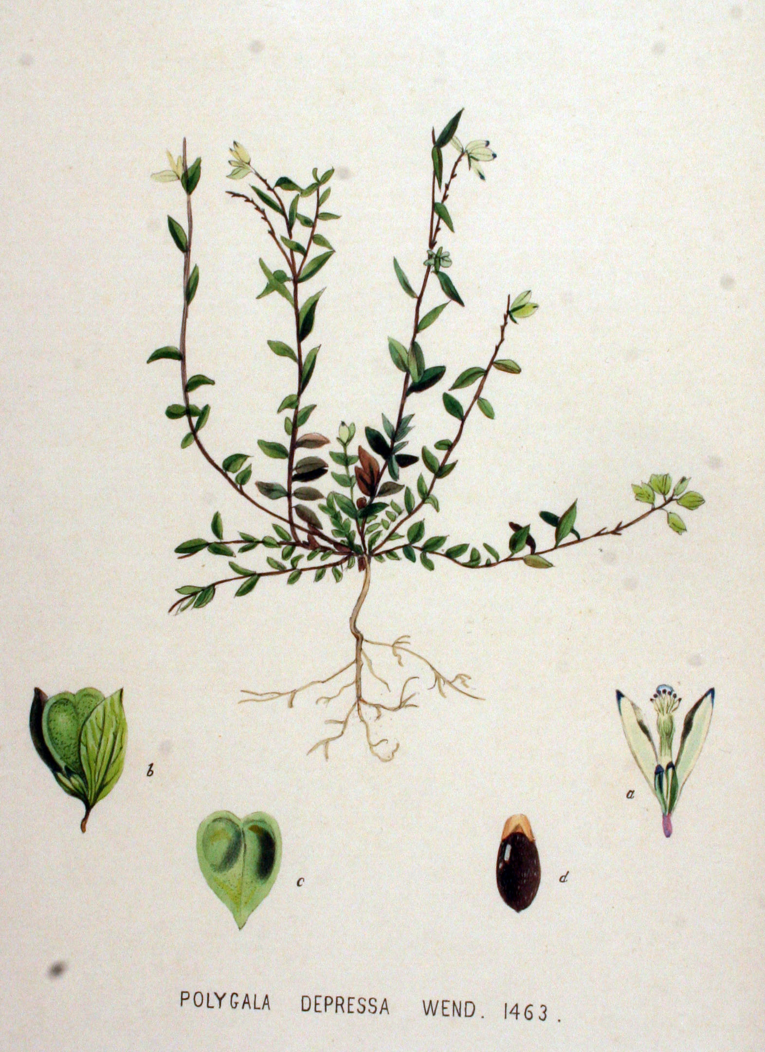 Polygala serpyllifolia Hose (Syn. Polygala depressa Wender.)